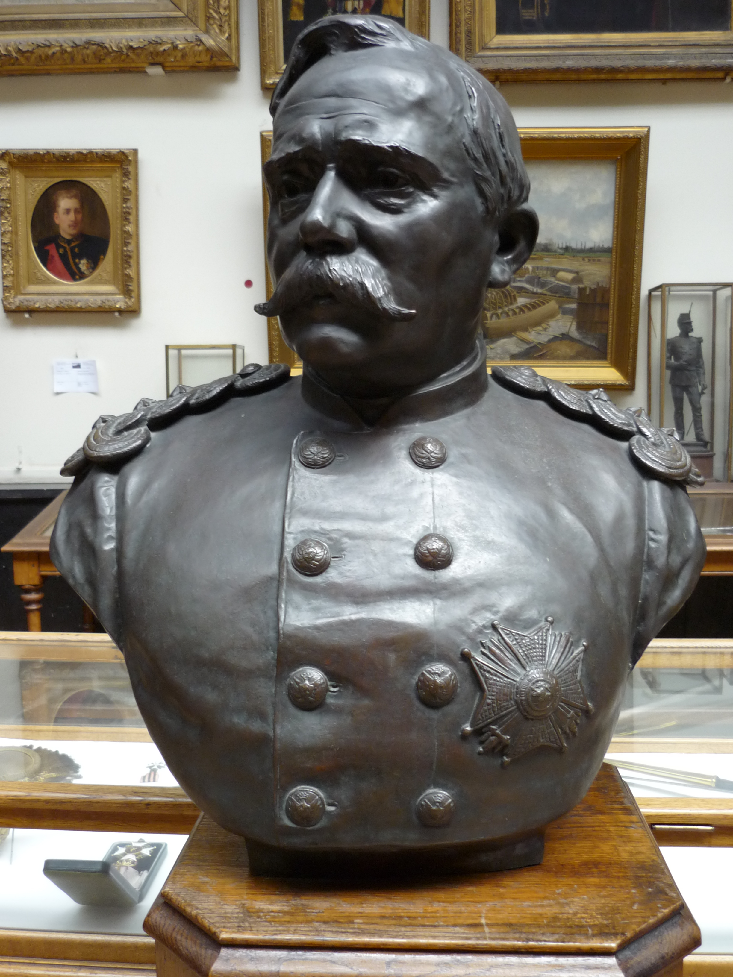 Buste de Henri Alexis Brialmont, Musée du Cinquantenaire, Bruxelles, Belgique. Royal Museums of Art and History Native nameMusées royaux d’art et d’histoireLocationBrusselsCoordinates50° 50′ 25.85″ N, 4° 23′ 35.37″ E Established1835Web page control : Q945059 VIAF: 147671754 ISNI: 0000 0001 2342 957X GND: 1006854-5 SUDOC: 162391722 institution QS:P195,Q945059